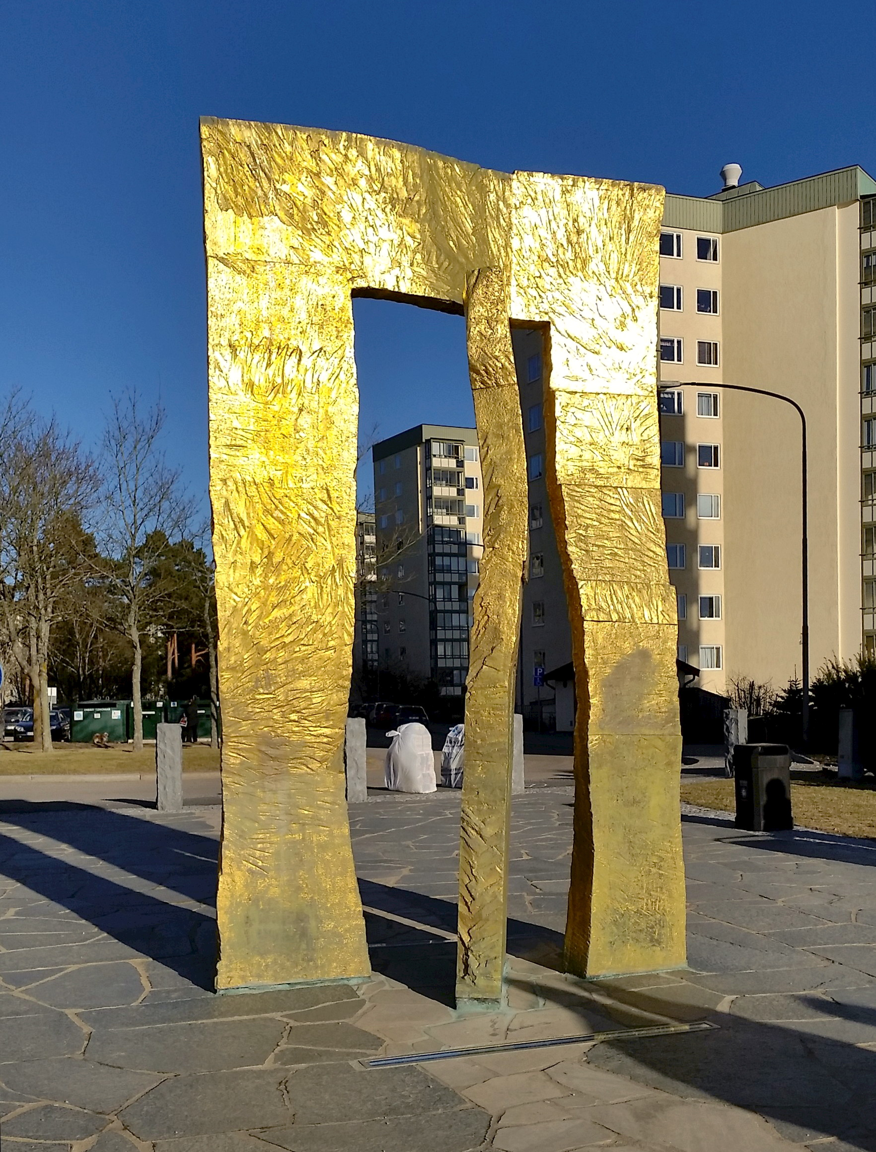 Porten (1971) - Björn Erling Evensen. Solna. Även känd som Guldporten. It is not clear whether freedom of panorama applies to this image. This is a depiction of a building or work of art in Sweden. The depicted work is believed to be protected by copyright. According to Article 24 of the Swedish copyright act, "Works of art may be depicted if they are permanently placed on or at a public place outdoors. Buildings may be freely depicted." It has been widely accepted that this provision made distribution of depictions such as this one legal. On 4 April 2016, however, the Supreme Court of Sweden issued a statement that the first paragraph in Article 24 does not extend to publication in online repositories, and on 6 July 2017, a lower court ruled that linking to depictions of copyrighted artworks hosted on Commons in a database constitutes copyright infringement. See COM:CRT/Sweden#Freedom of panorama for more information. The second paragraph in the article, about buildings, was not evaluated in the statement or ruling. The implications of these decisions on Commons' ability to continue to distribute this and other depictions like it are currently under analysis. Reusing or linking to this file can have legal consequences, unless if the artist has died before 1 Jan 1950, to which either PD-Sweden-photo or PD-old-70 may applied. You are solely responsible for ensuring that you do not infringe the copyright belonging to someone else. See our general disclaimer for more information.